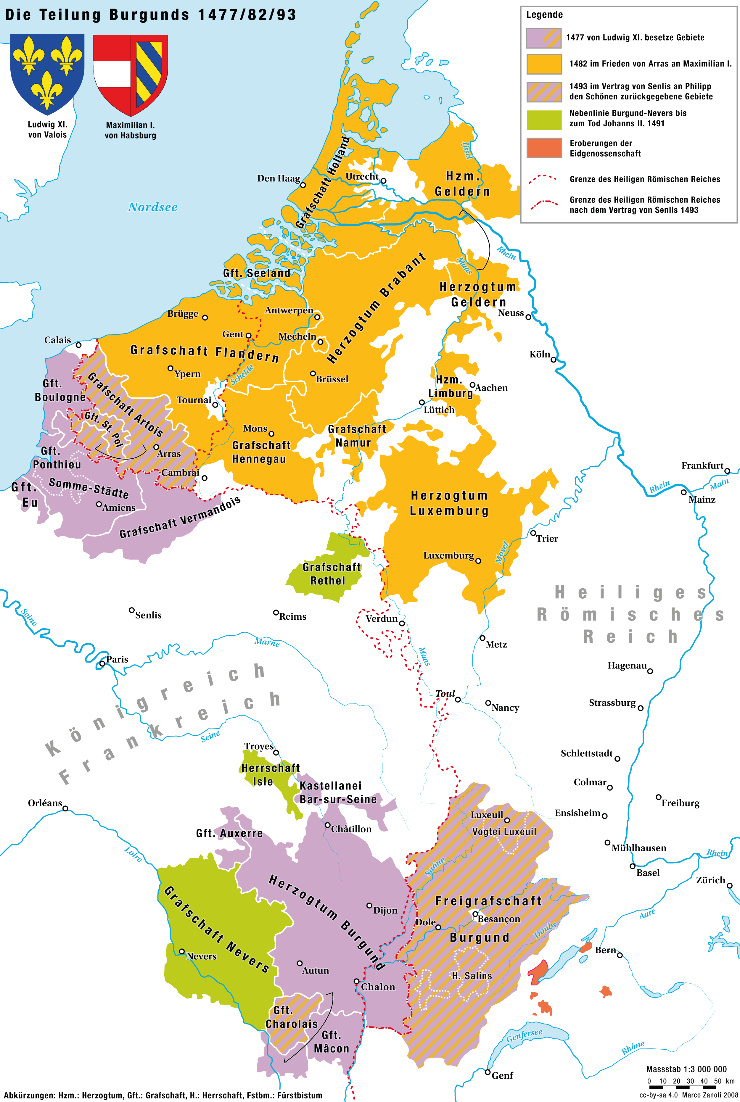 Die Aufteilung des Herrschaftsgebiet Karl I., «des Kühnen», zwischen Frankreich und Habsburg zwischen 1477 und 1493